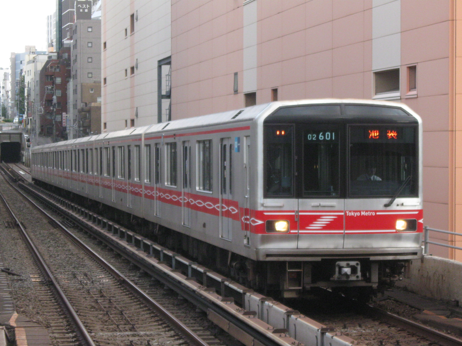 東京メトロ02系02-101F（更新後）